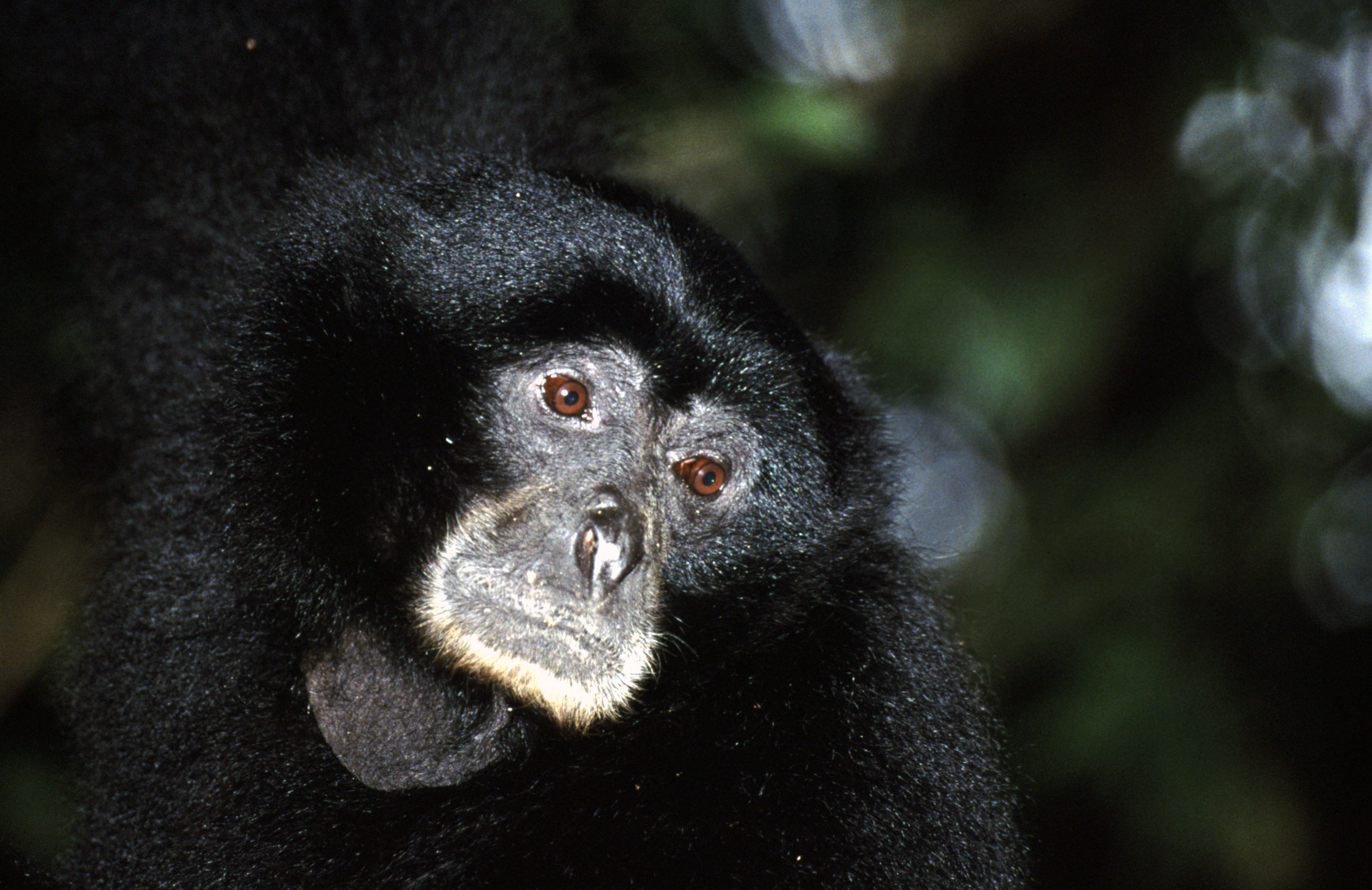 Gunung Leuser NP, Sumatra, INDONESIA